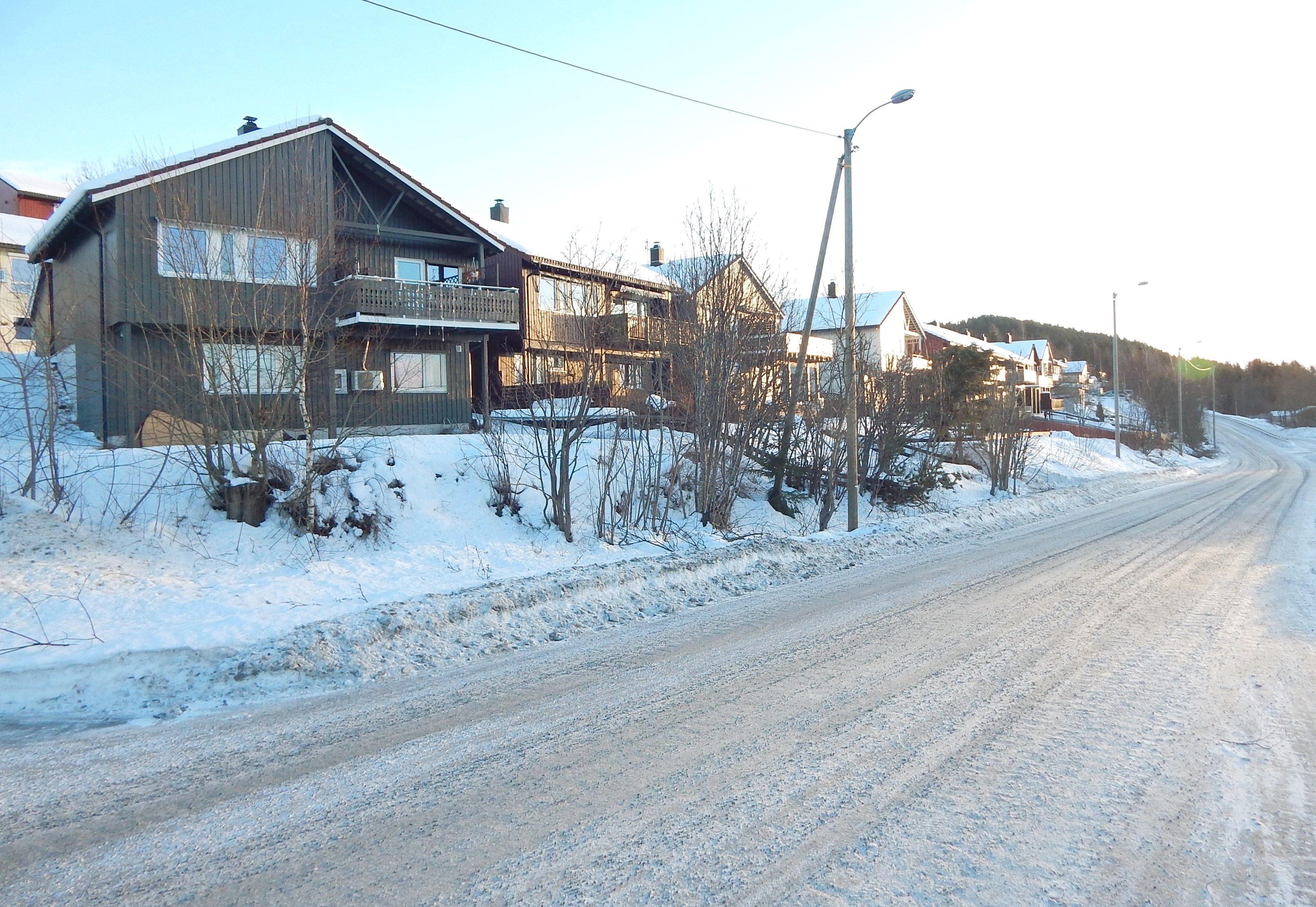 Blomstervegen er hovedveien gjennom Vårsetergrenda.